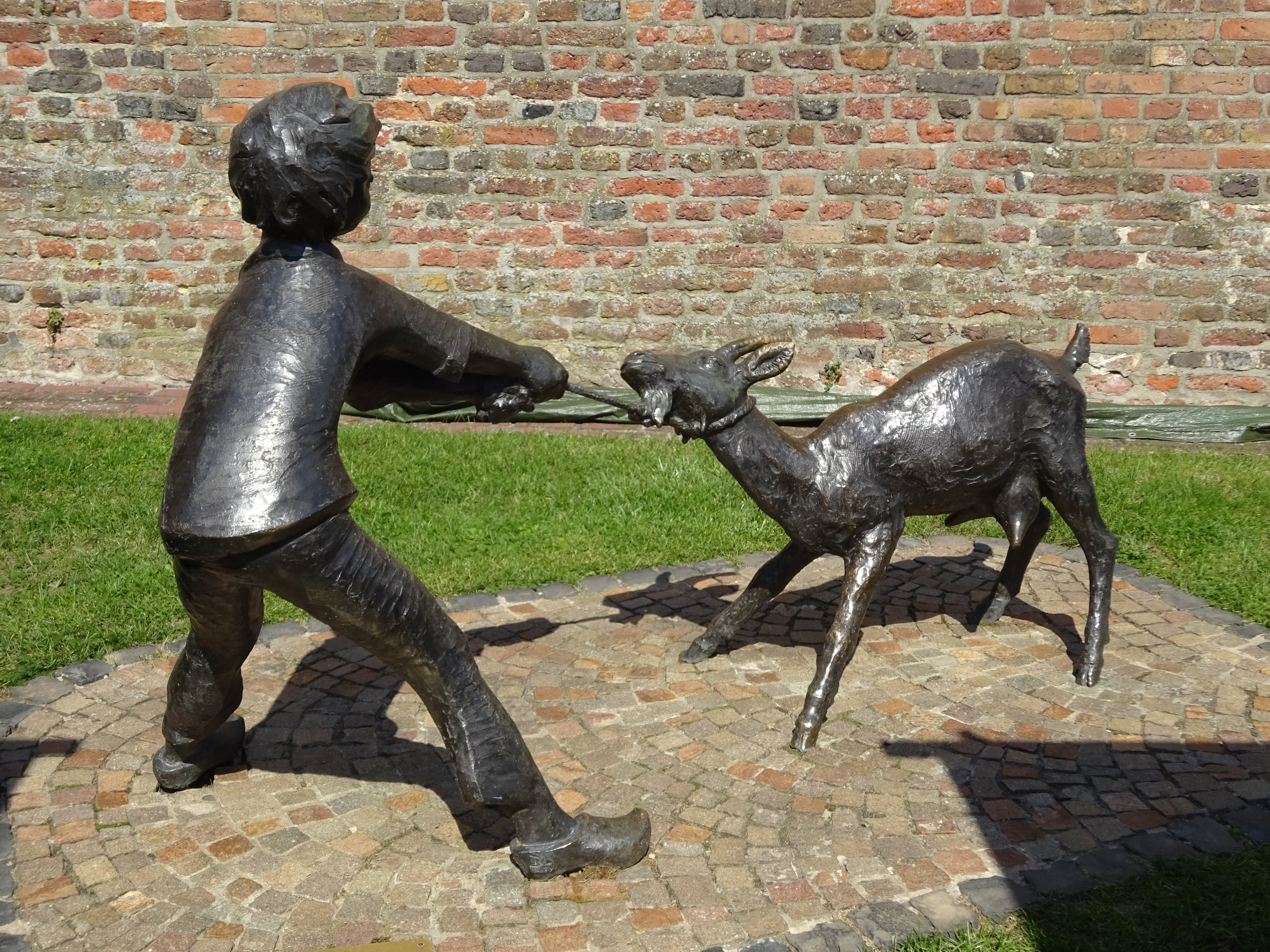 Rees, Ziege door Dieter von Levetzow